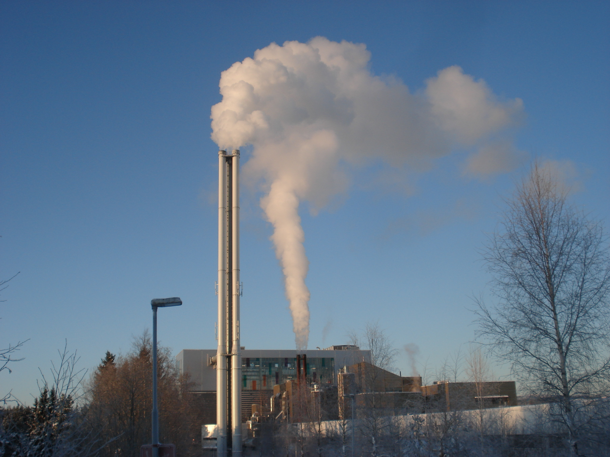 Trondheim Energi Fjernvarme, Tiller.